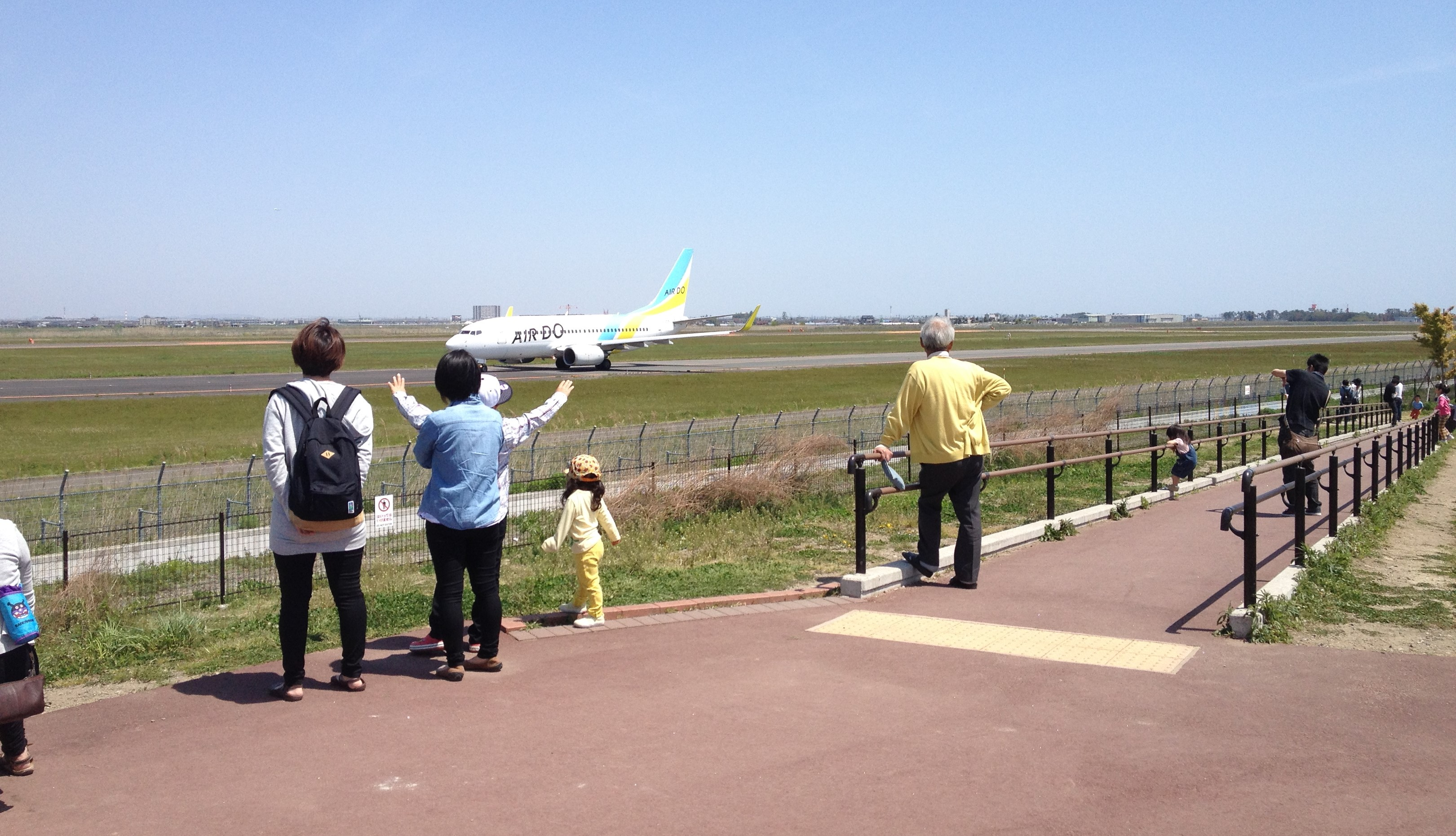 仙台空港臨空公園 エアドゥ機とギャラリー